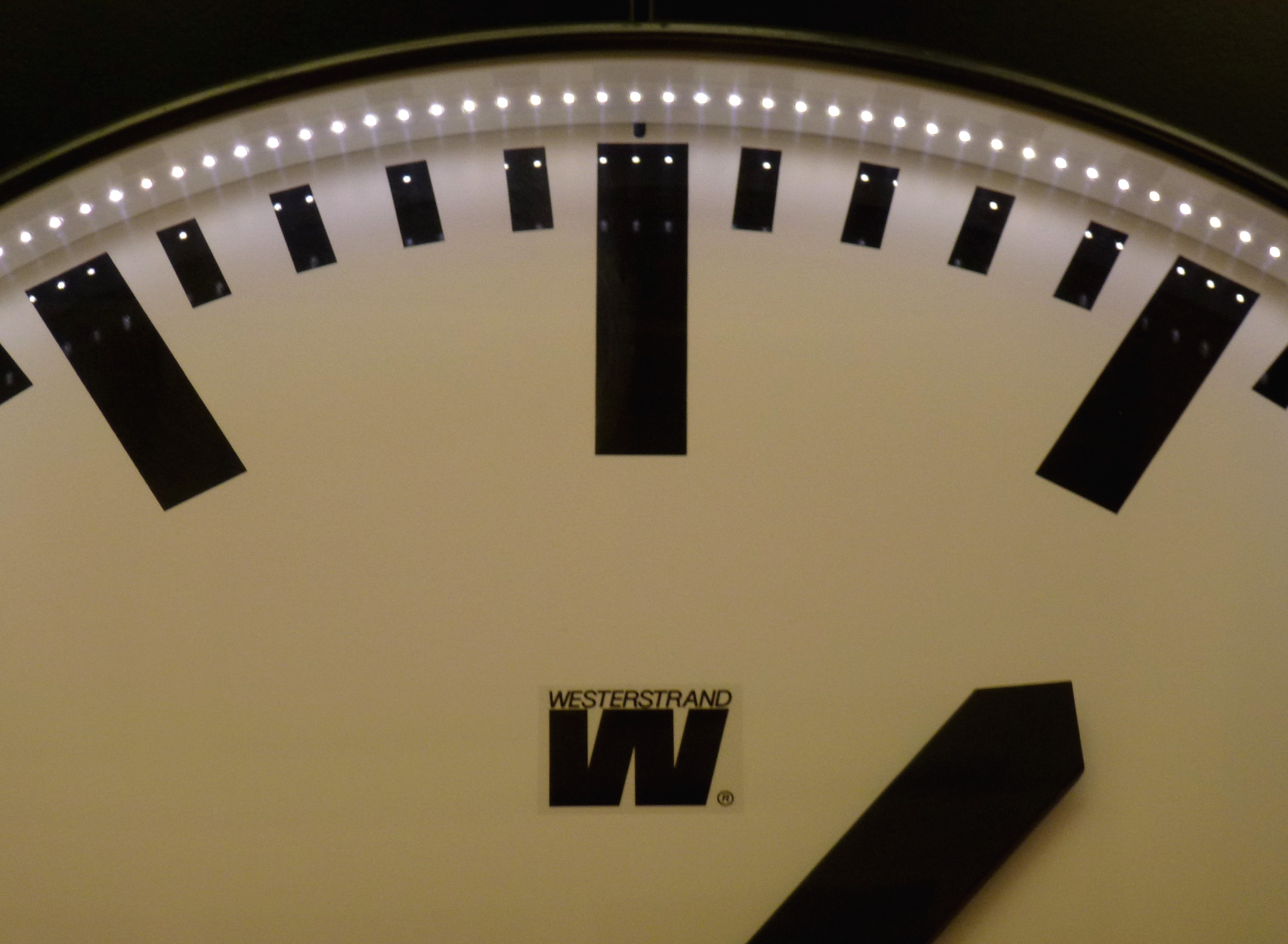 Huvudklocka Stockholms central, detalj